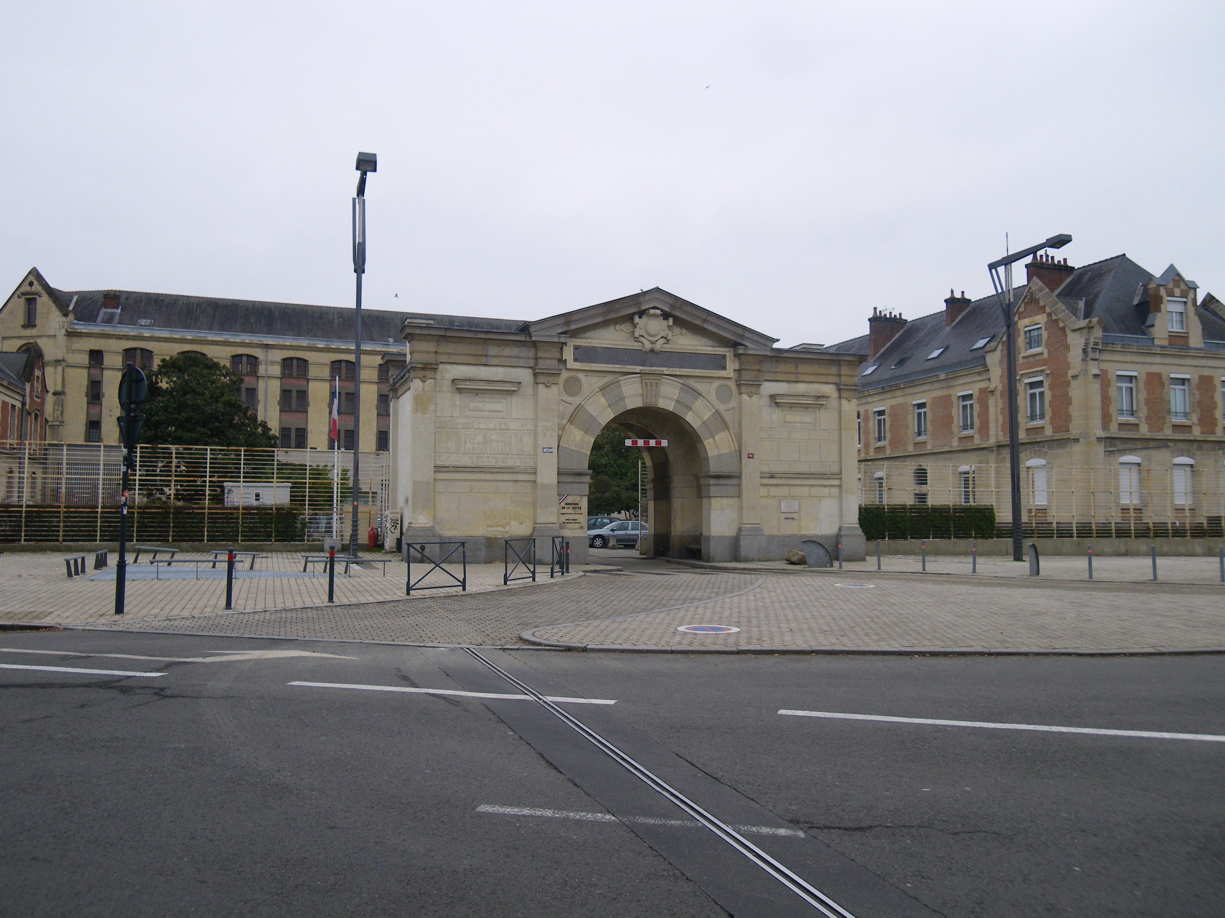 l'entrée de la prison des femmes a rennes